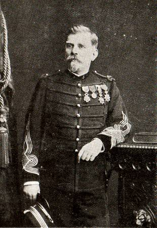 Joseph Joffre, chef de bataillon, en 1889. Photographie reproduite dans The Illustrated London News, 23 janvier 1915.